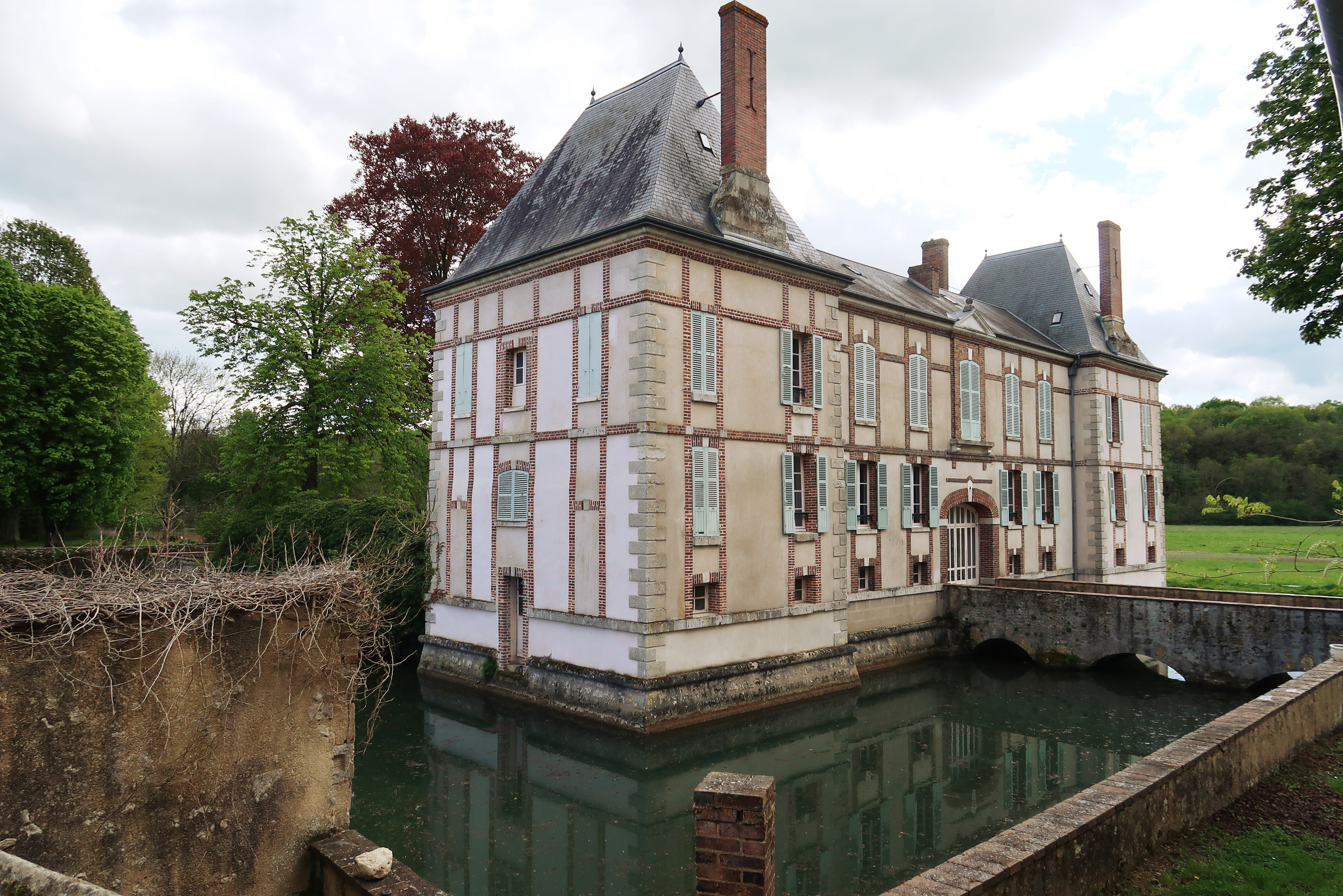 La Selle-sur-le-Bied, château .